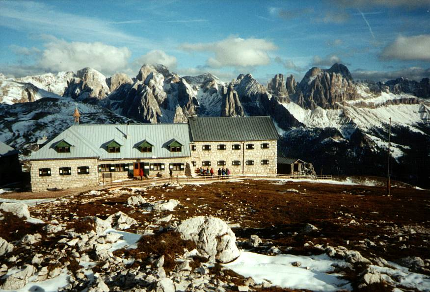 Abend am Schlernhaus